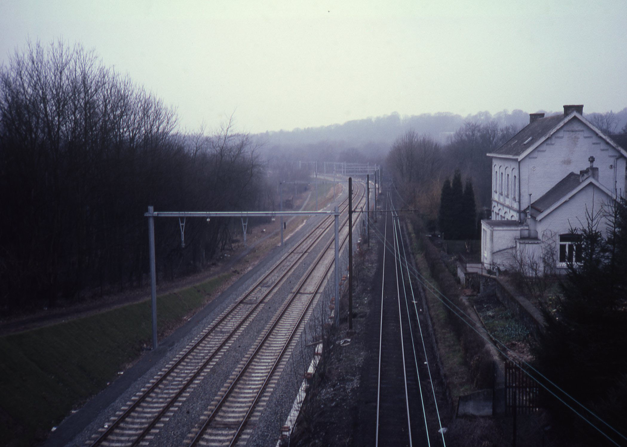 De NMVB lijn 80 langs de spoorlijn 112 die geëlektrificeerd wordt. Genomen vanaf de brug richting La Louviere.